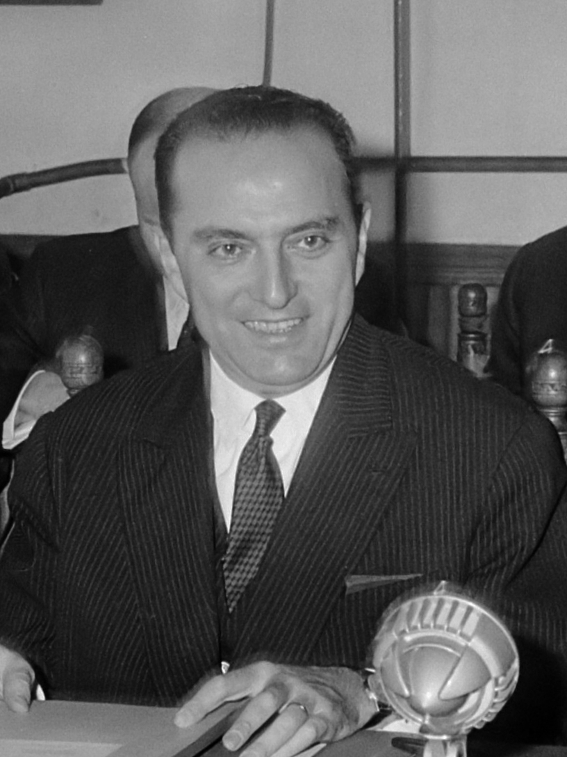 Ministerraad van de West-Europese Unie. Staatssecretaris van Buitenlandse Zaken van Frankrijk, Michel Habib-Deloncle (midden) 4 november 1965